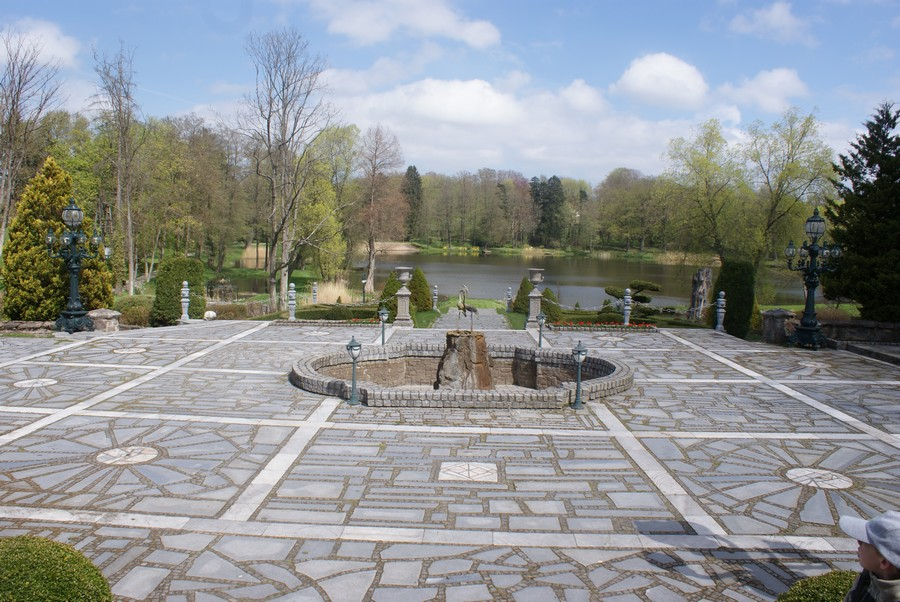 Strzekęcino